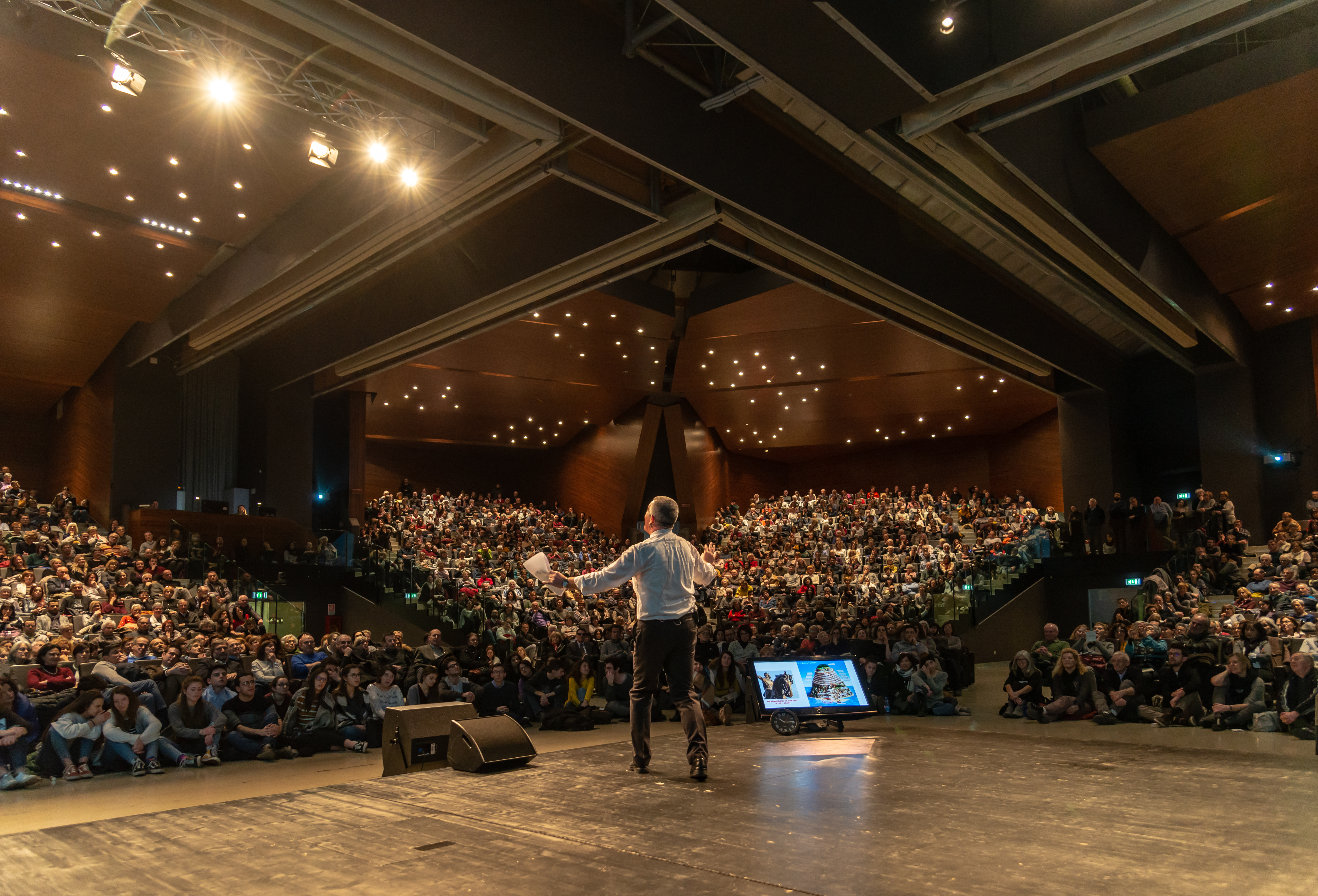 Uno scatto di una delle serate con la Divina Commedia tenute dal prof. Gregorio Vivaldelli al PalaRotari di Mezzocorona (TN)